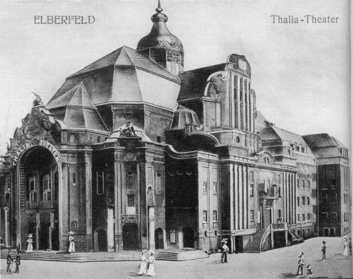 Wuppertaler Thalia-Theater kurz nach der Eröffnung 1906